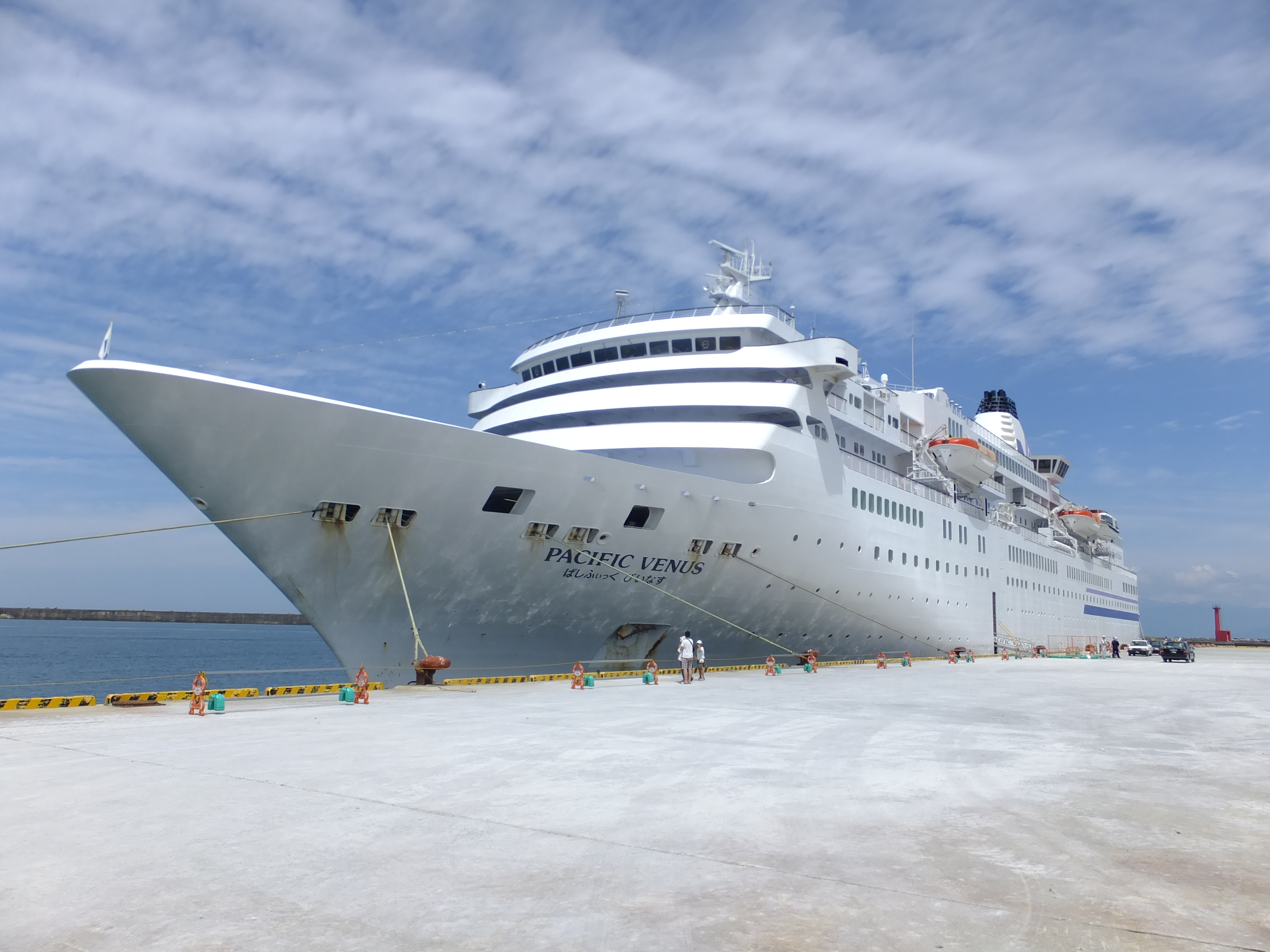 能代港に寄港したクルーズ客船「ぱしふぃっくびいなす」。能代港40,000トン岸壁にて